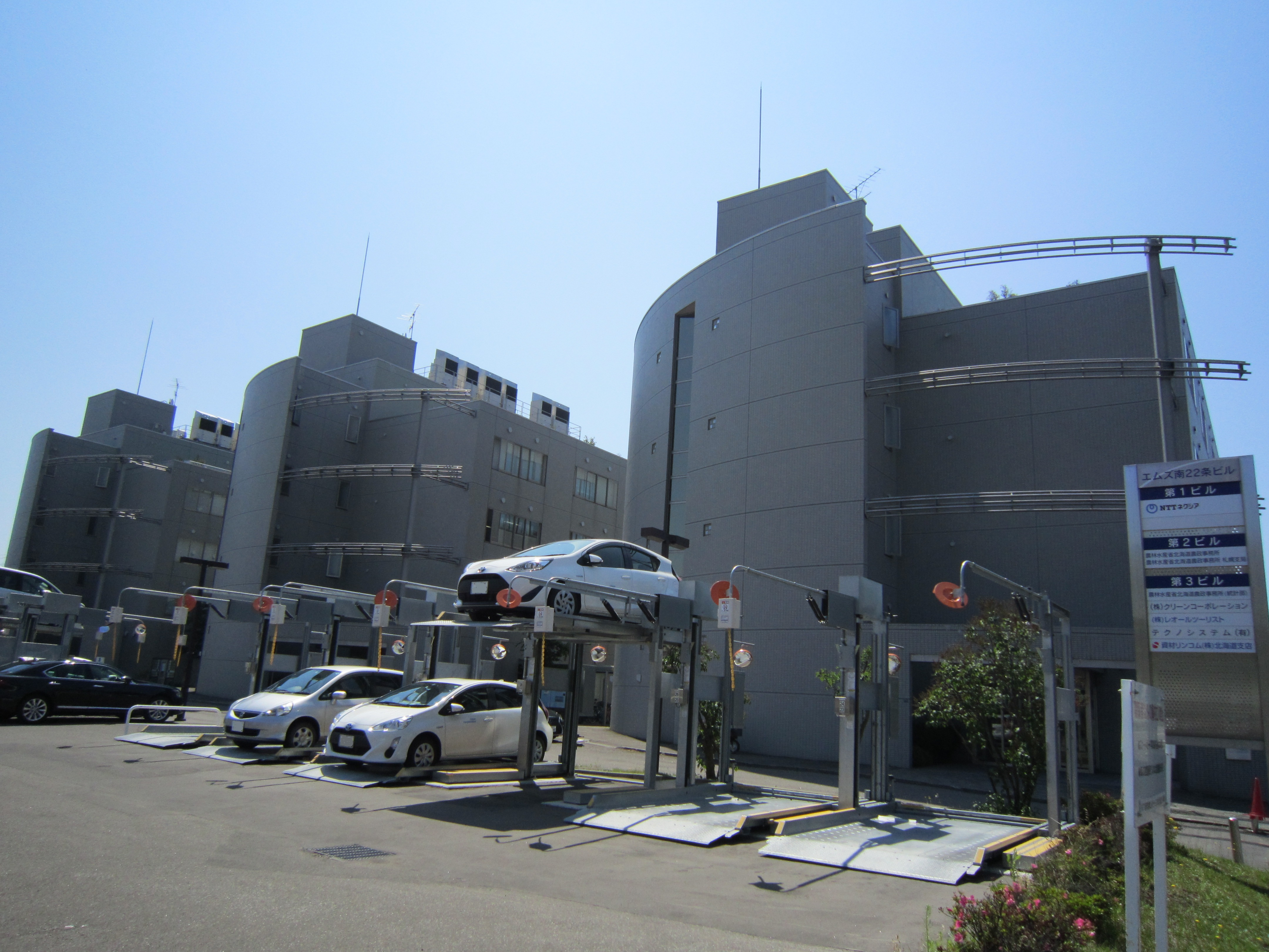 エムズ南22条ビル